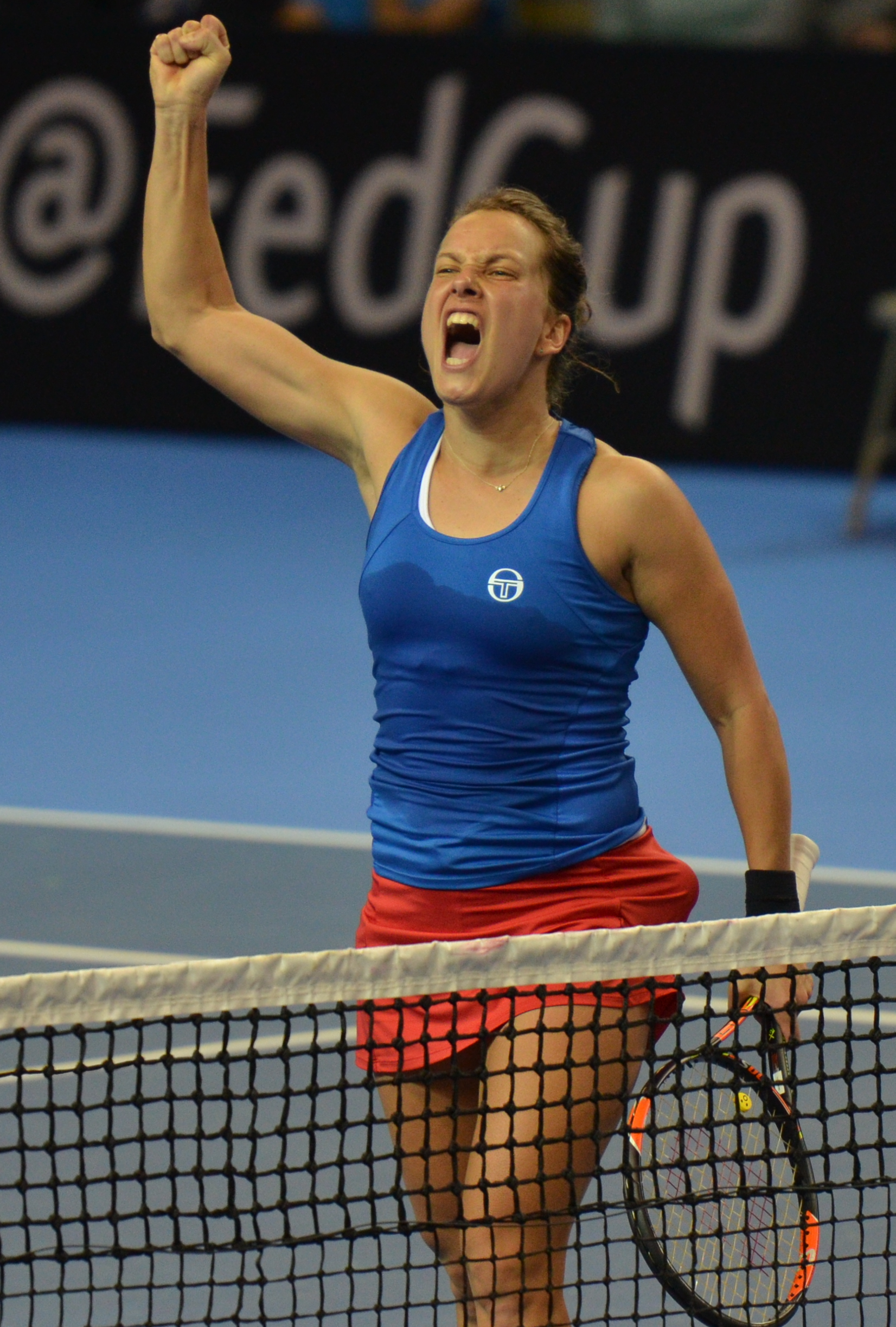 PPP_3373